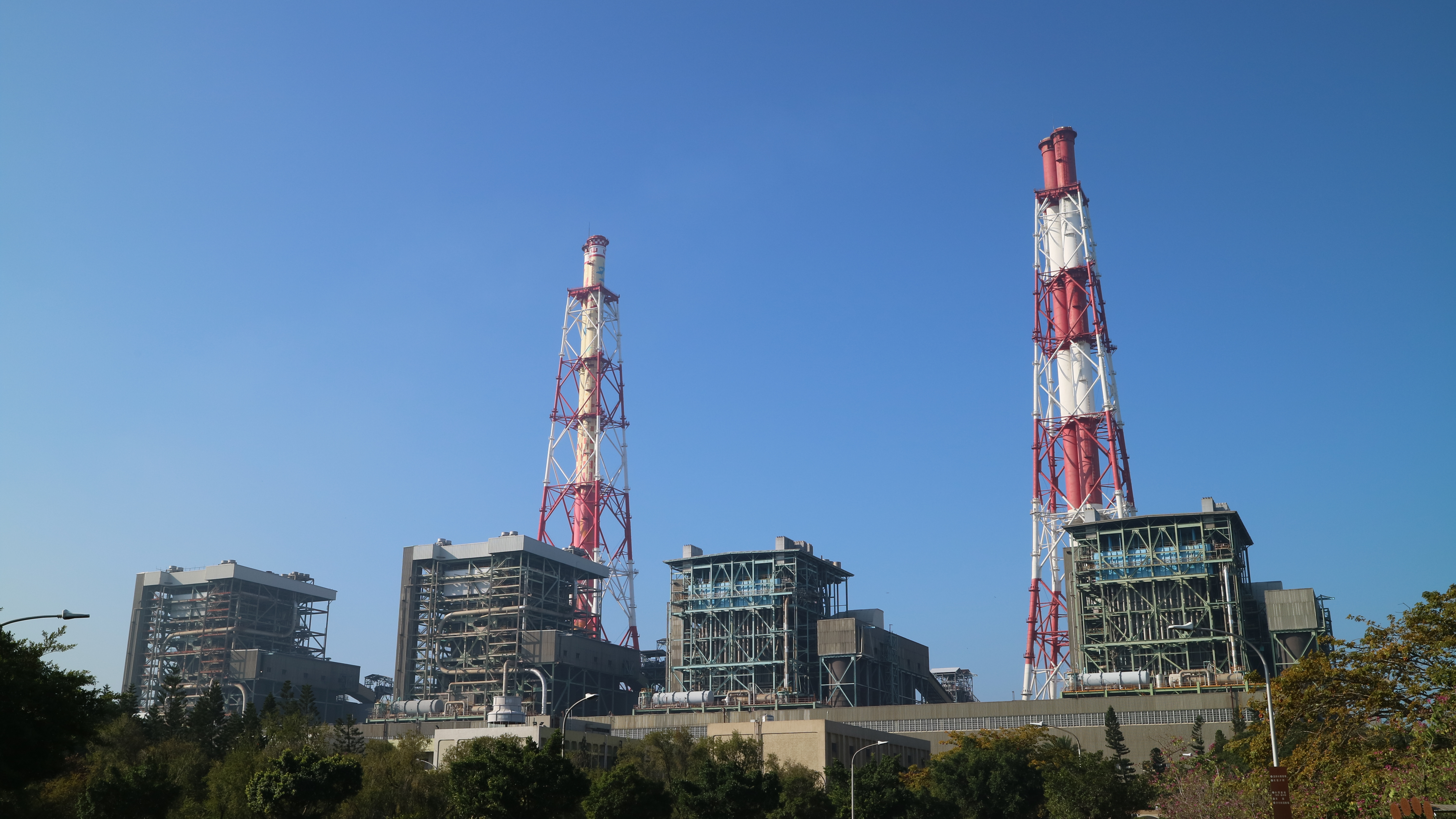 臺灣高雄市興達發電廠四部燃煤發電機組鍋爐房外觀及煙囪